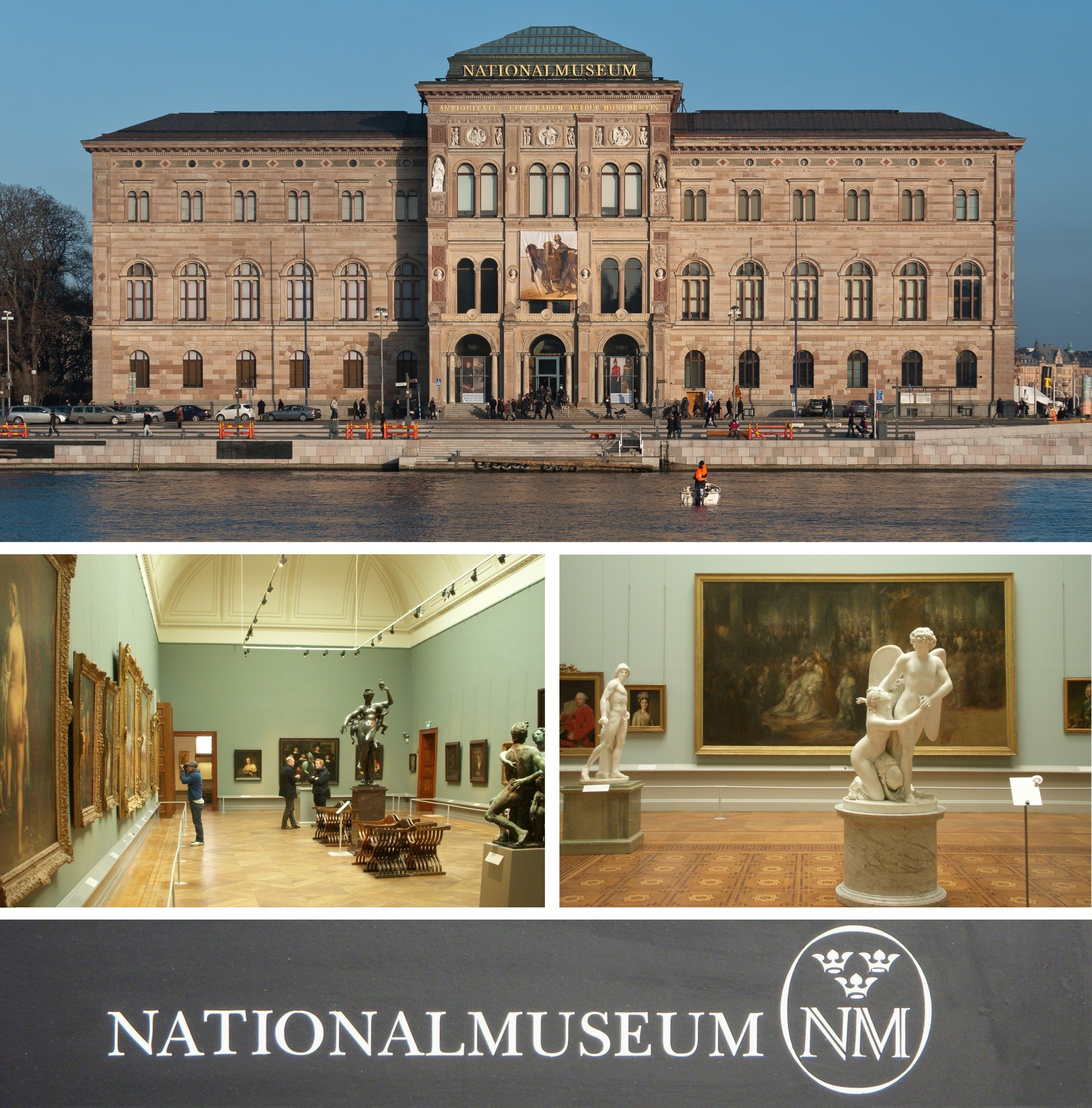 Nationalmuseum, Stockholm: Bildkollage